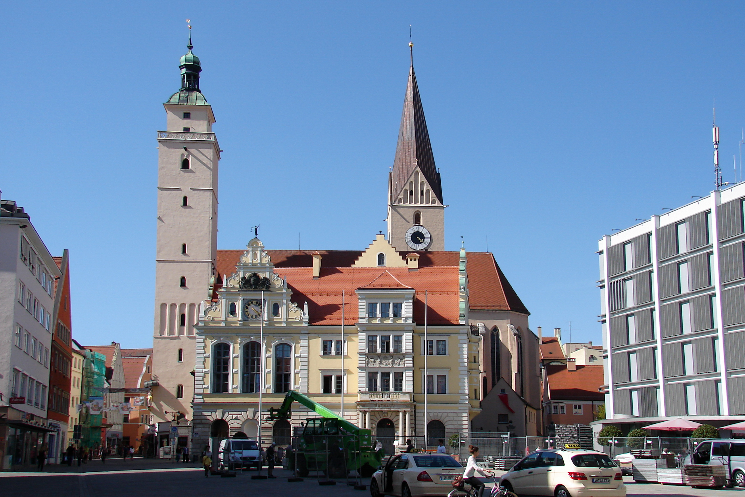 Altes Rathaus. Eine Vereinigung von vier Häusern